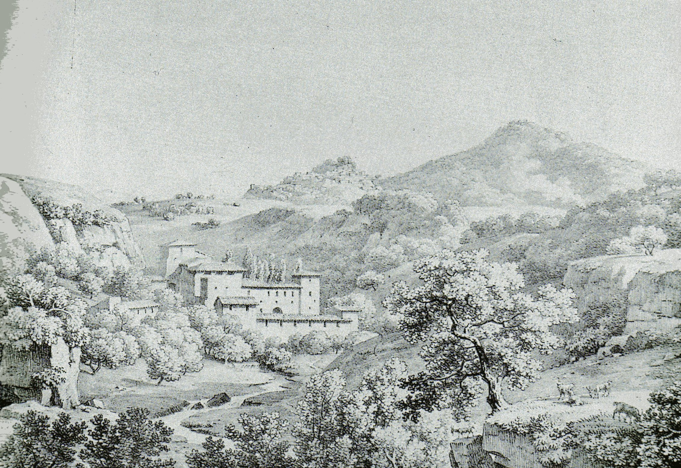 Le cartiere di Ggrottaferrata (RM9 nel 1818)